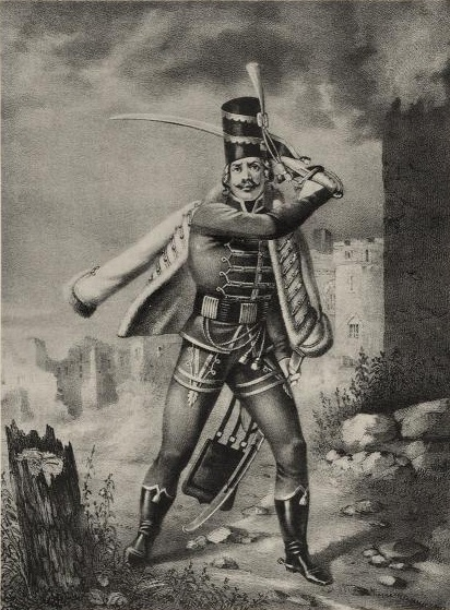 Рядовой Бахмутского Гусарского полка, с 1764 по 1774 г.